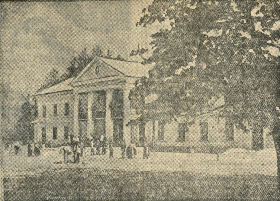 Беларуская (тарашкевіца): Дукора (Dukora), палац Ашторпаў (Aštorp) і Гартынгаў (Harting)